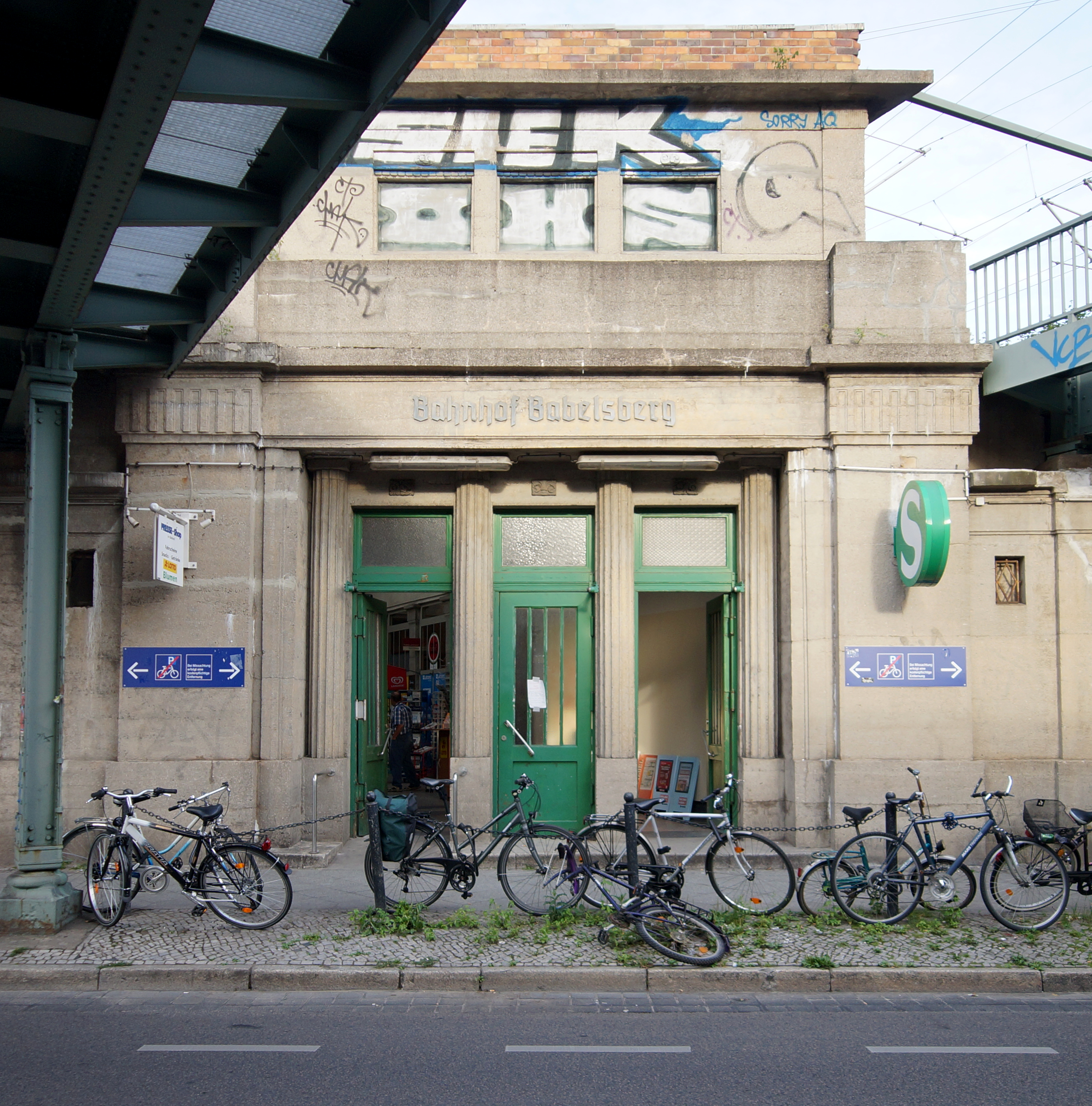 Der Westeingang des Bahnhofs Potsdam-Babelsberg